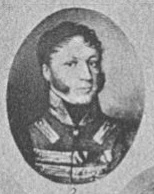 Friedrich von Greis (1779-1847), geadelter bayerischer Generalmajor